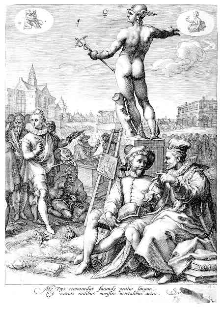 Гендрік Гольціус (1558—1617), малюнок, гравер Ян Санредам « Меркурій і особи, котрими він керує», серія «Сім планет» і знаки зодіака, гравюра, 1597 р., Державна галерея, Штутгарт. Mercury [from the series The seven planets].